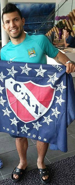 Sergio "Kun" Agüero con una bandera del Club Atlético Independiente.